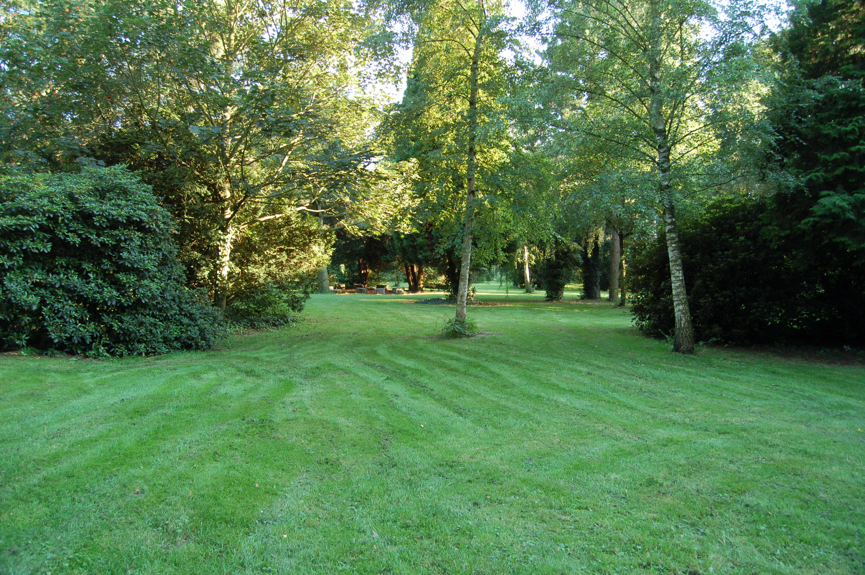 Blick in den Cäcilie-Bleeker-Park